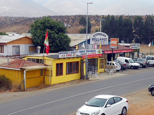 C. Salazar escribe: Curiosamente, en el corazón de la actividad quesera caprina chilena, se encuentra uno de los más cotizados centros de producción de quesos a base de leche bovina y "algo más", en este caso de variedad mantecosa: Huentelauquén, una localidad que, para muchos viajeros, se ha convertido ya en la parada obligatoria entre La Serena y Los Vilos, unos 20 kilómetros al Norte del balneario de Chigualoco, al que ya nos hemos referido en este blog. Huentelauquén es un pueblo repartido a ambos lados del río Choapa, en la Ruta 5 Norte, cerca de la línea de costa. A los dos caseríos, pertenecientes a la comuna de Canela, se los distingue entre sí como Huentelauquén Norte y Huentelauquén Sur, siendo este último aquel donde podemos hallar el paraíso de quesos mantecosos de campo y sus sabrosísimas empanadas fritas generosamente rellenas de este mismo producto, en venta a los costados de la autopista. Hace unos años se instaló allí una pasarela para facilitar el tránsito peatonal entre ambas veras del camino, que cuenta con buenos estacionamientos y accesos a las vías laterales donde está el comercio.